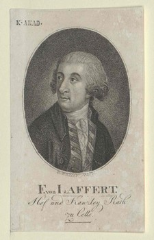 Porträt Ludolph Friedrich von Laffert, Hofrat in Celle